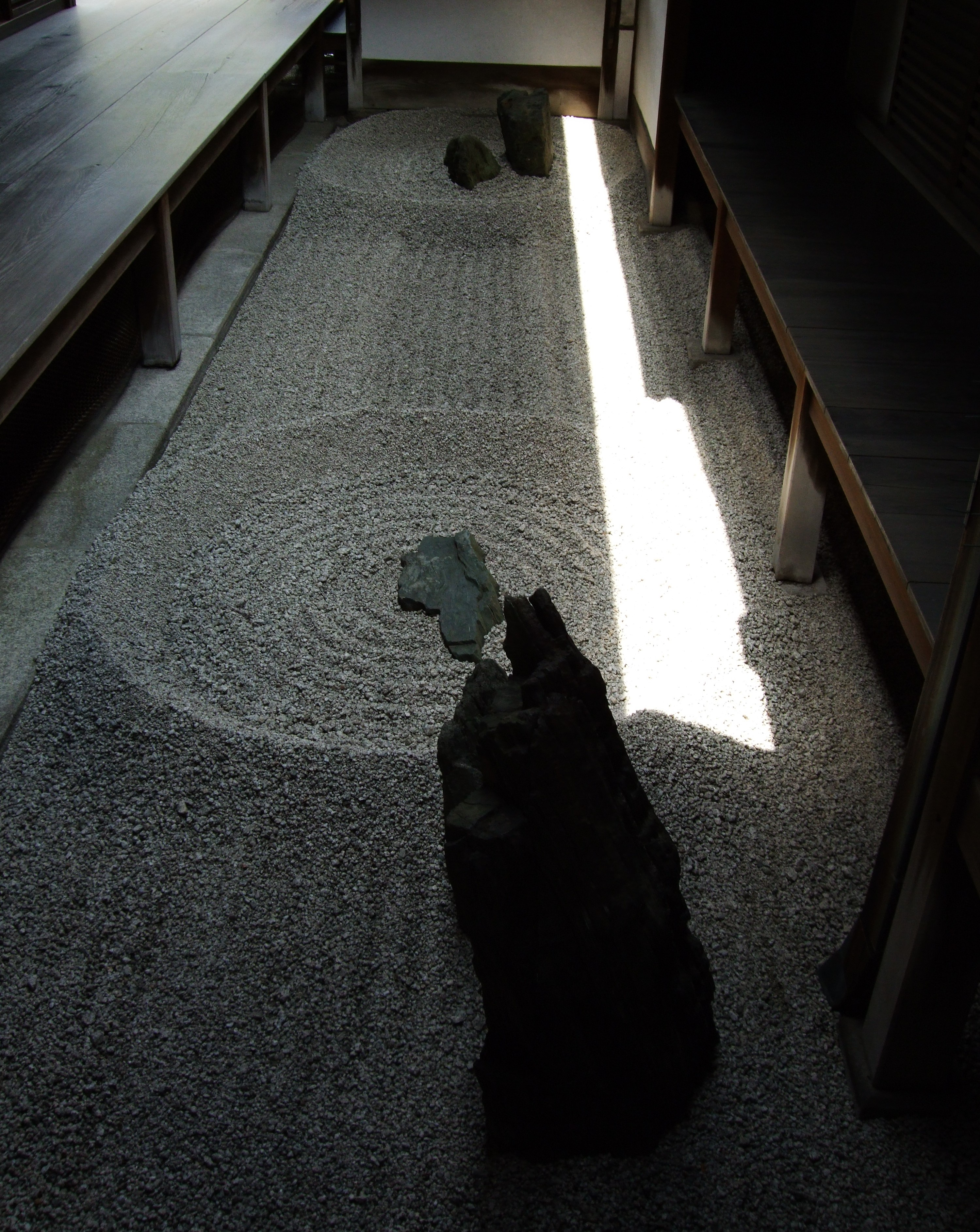 龍源院 東滴壺